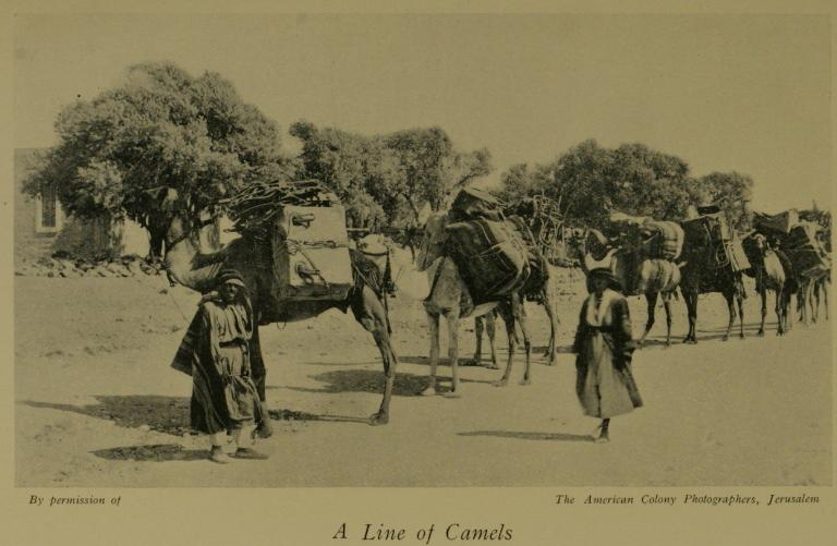 Caravana.